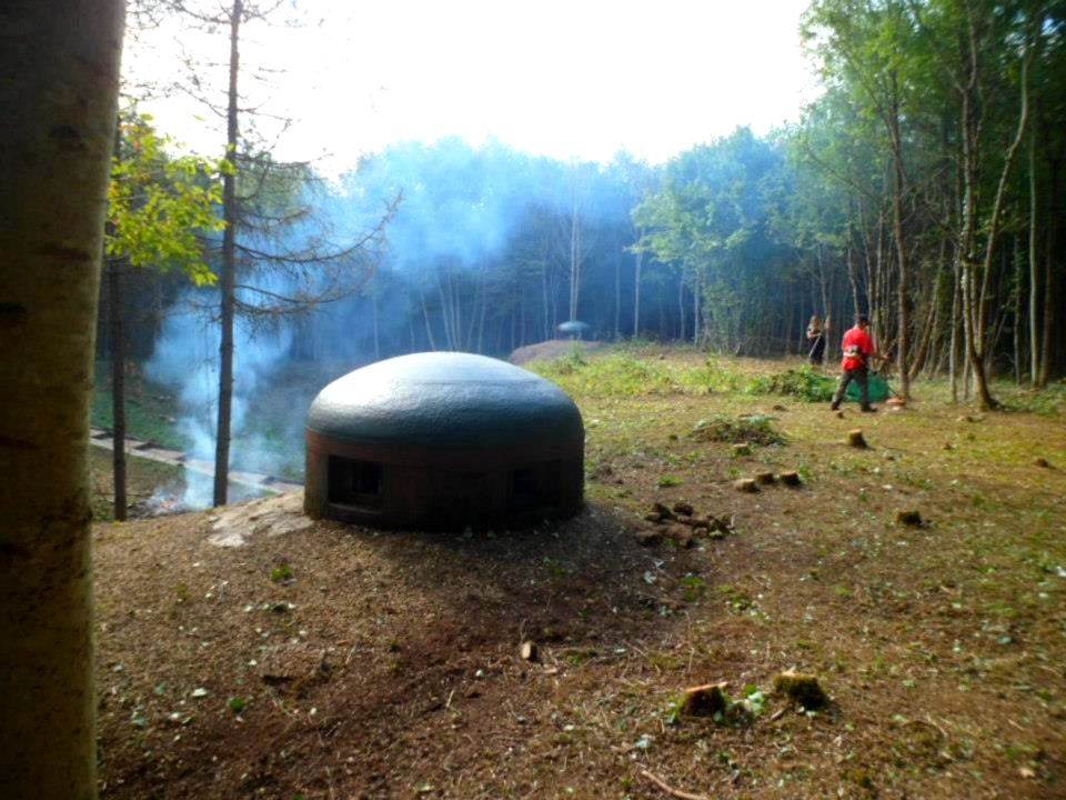 Déboisage sur les dessus de l'Abri du Gros Bois